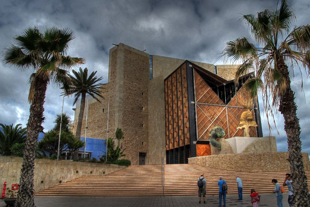 Auditorio Alfredo Kraus - Las Palmas de Gran Canaria - Islas Canarias